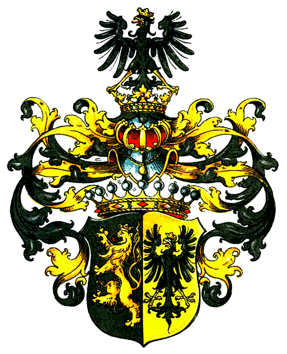 Wappen derer von Saurma-Jeltsch